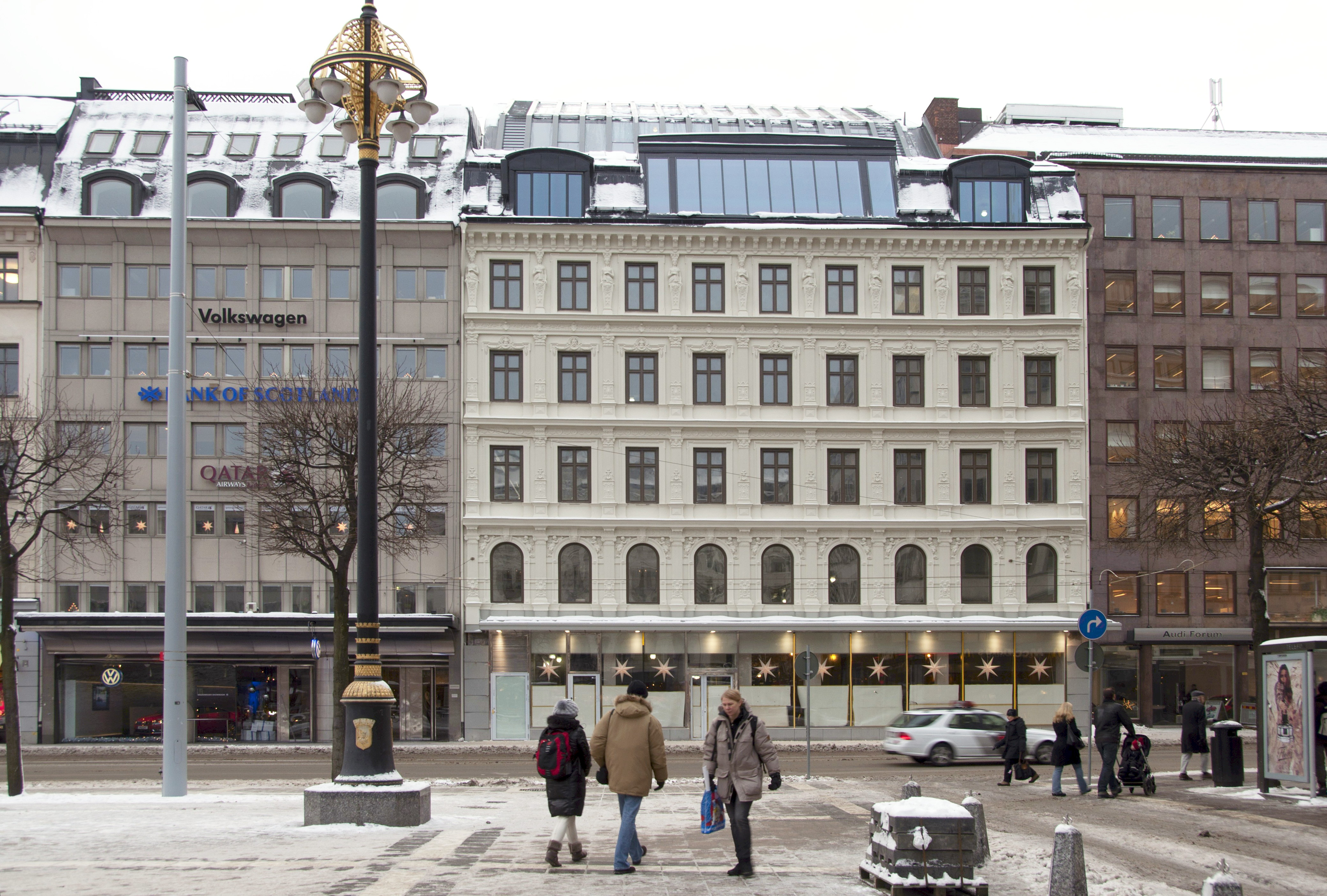 Hamngatan 15, MEA-huset Byggnadsår 1881, arkitekt Oscar Erikson, byggherre Wilhelm Davidson